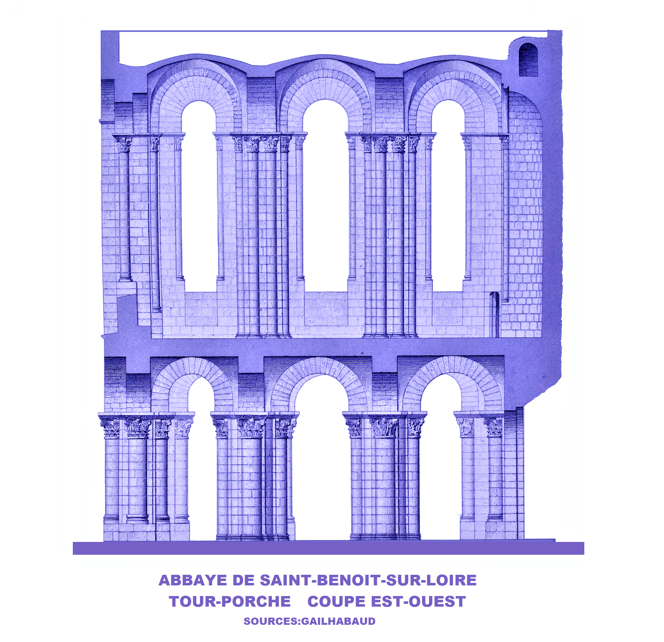 Abbaye de Saint-Benoît-sur-Loire, Coupe sur Tour-Porche (image du domaine public (Gailhabaud, 1858) modifiée)